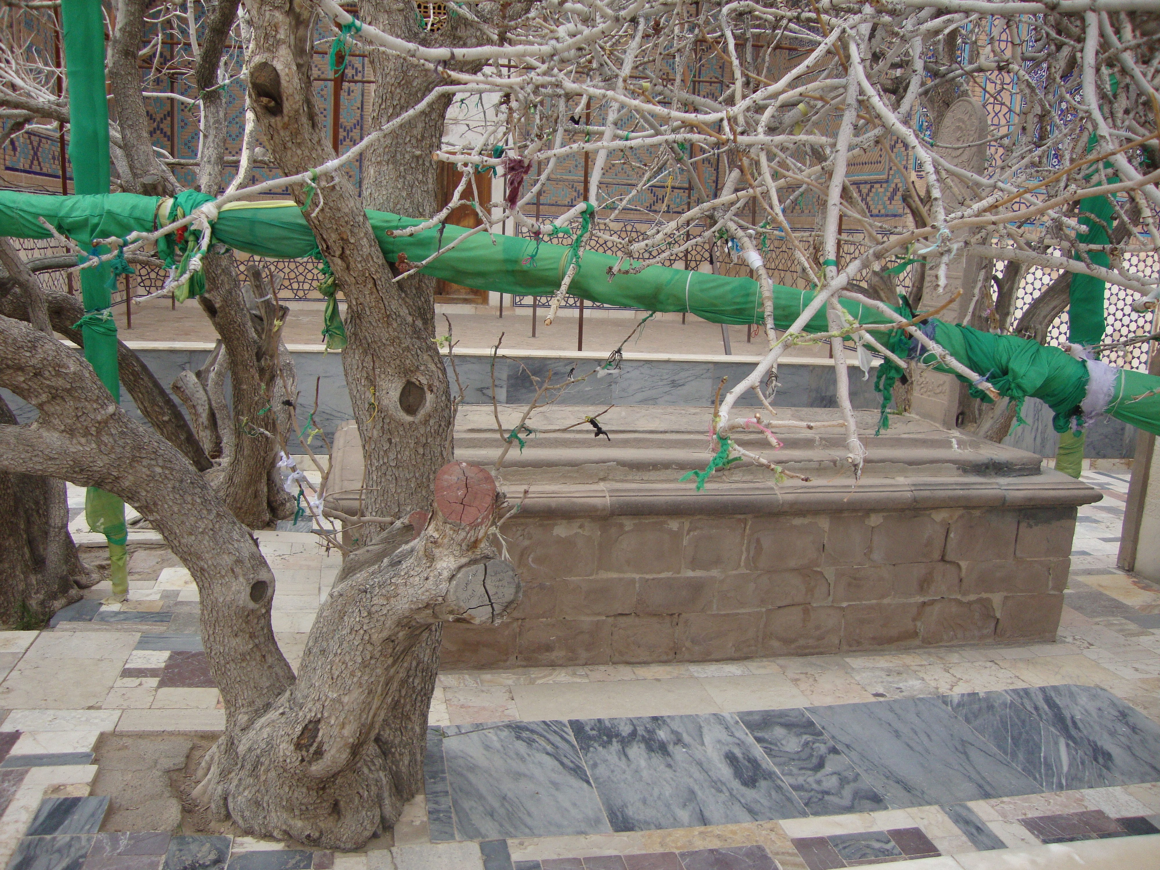 مزار مولانا ابوبکر تایبادی (عکاس:الیاس استاد)تایباد